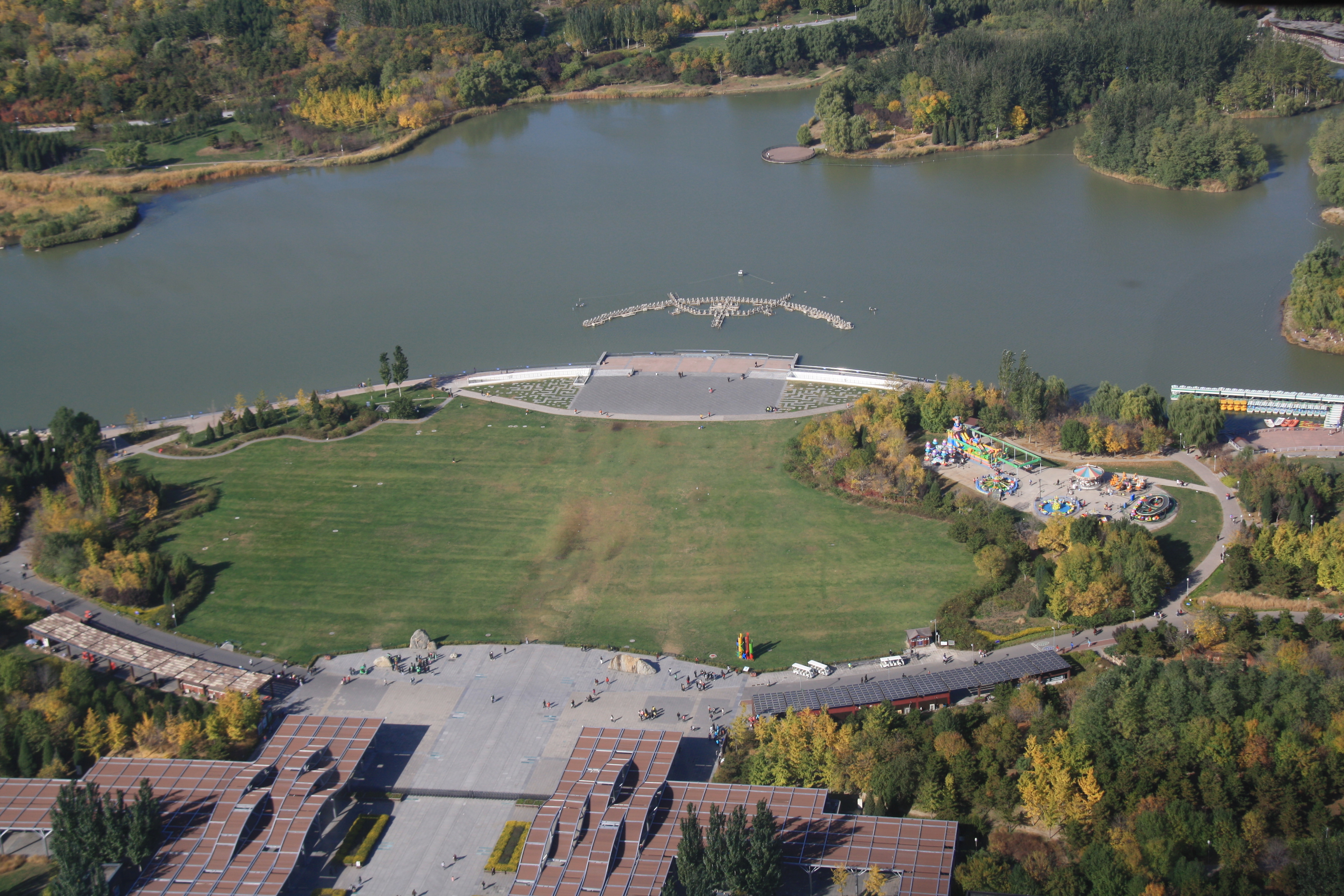 在北京奥林匹克塔上看到的奥林匹克森林公园南门内绿地